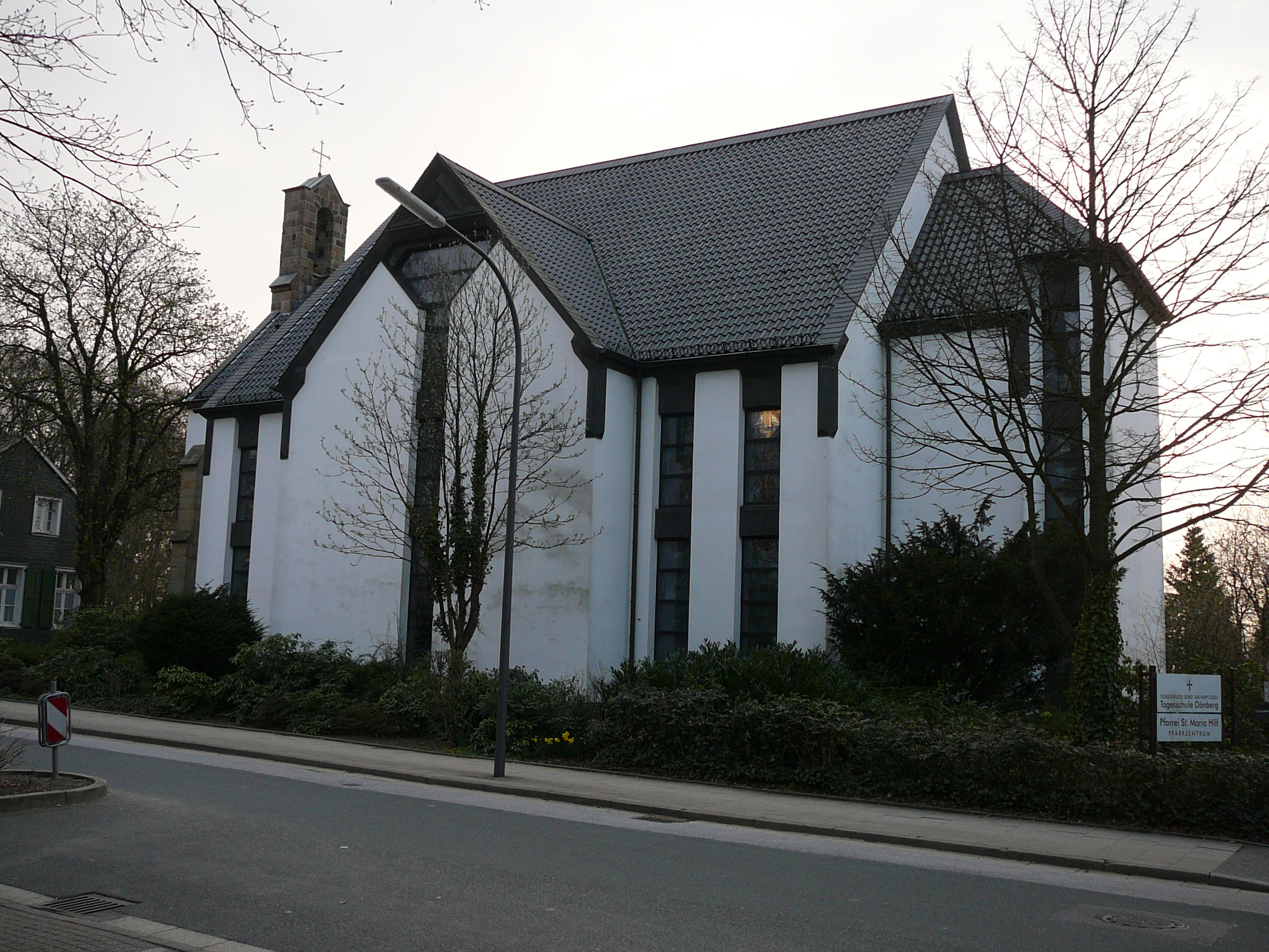 Höhenstraße, Wuppertal